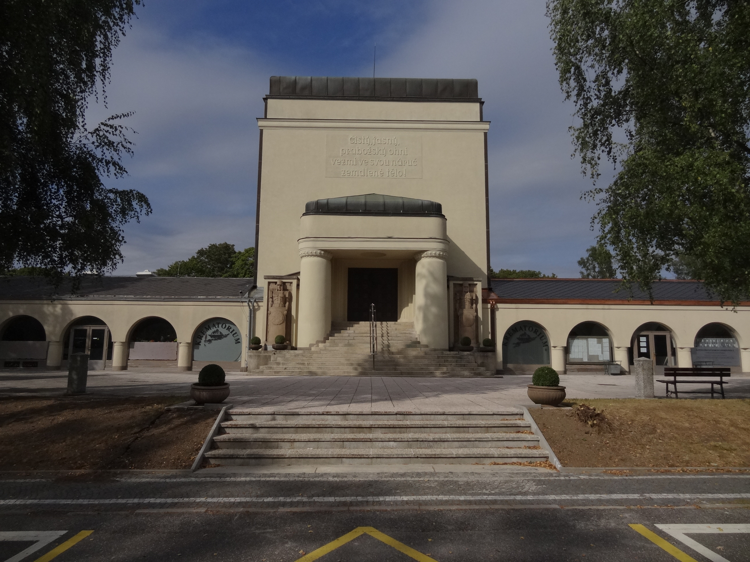 Krematorium, U krematoria 460/7, Perštýn, Liberec.